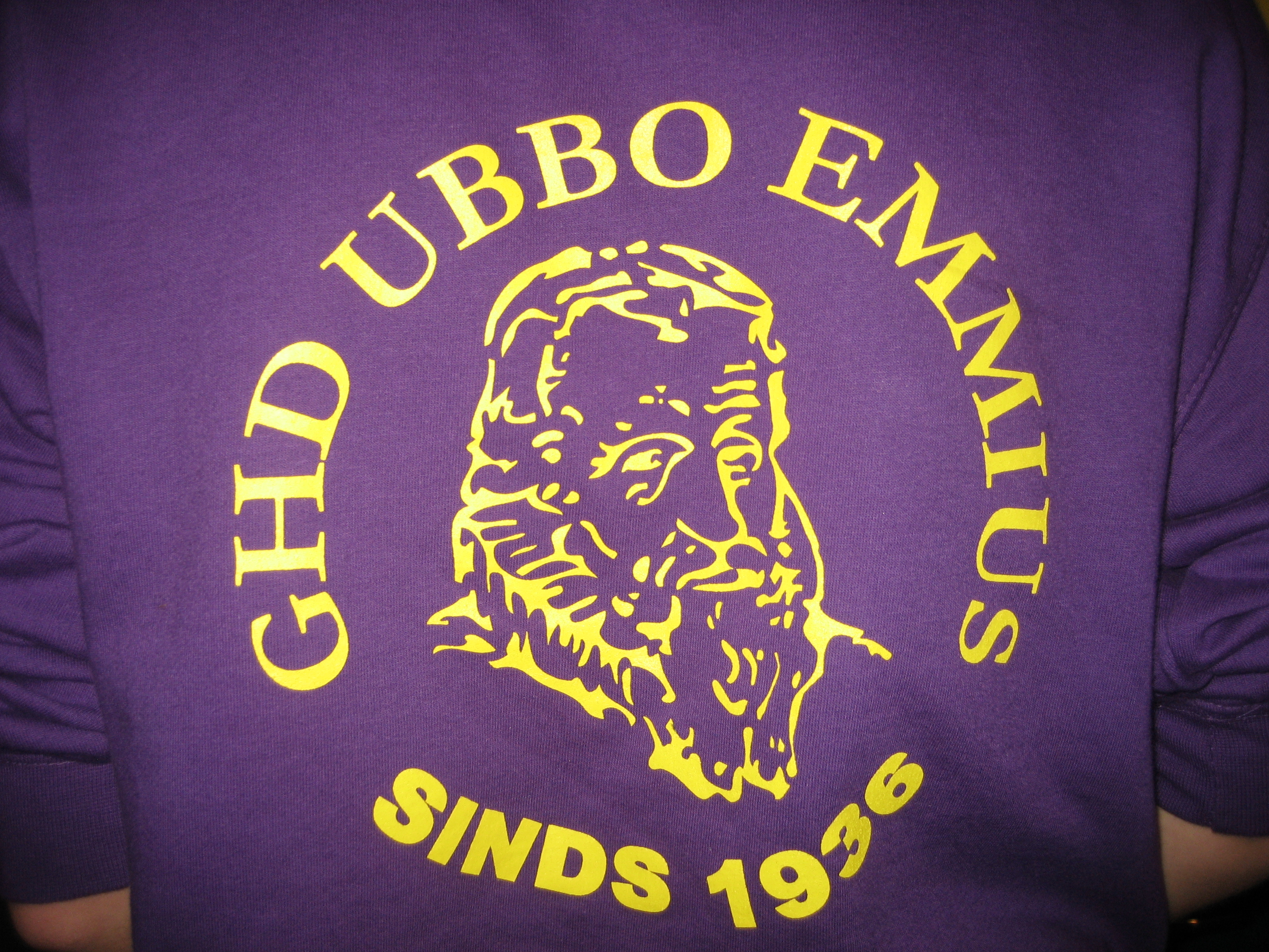 Studievereniging Geschiedenis-studenten Rijksuniversiteit Groningen (sweater)